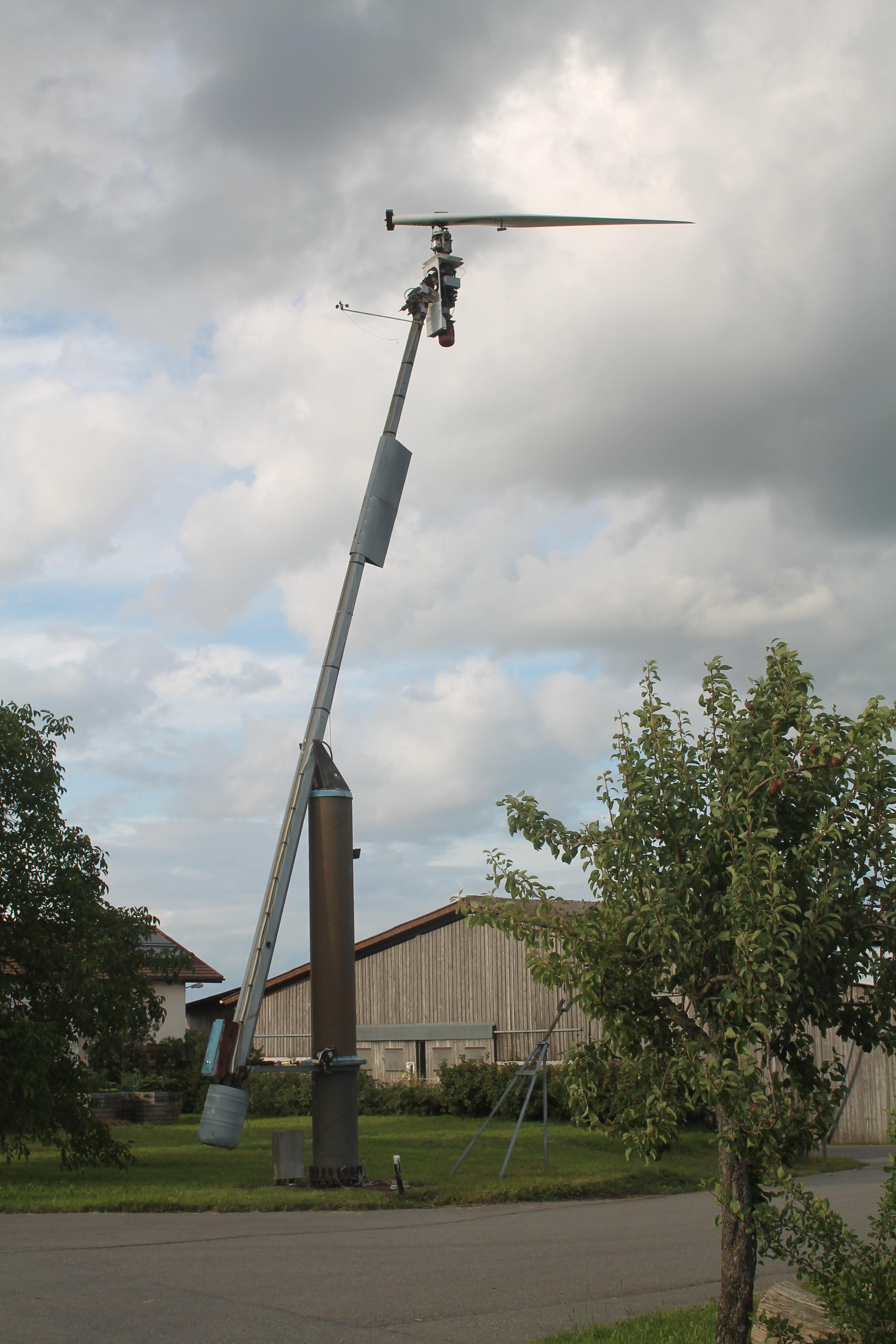 Einflügel-Windkraftanlage südlich von Wurmberg - OpenStreetMap(Info)